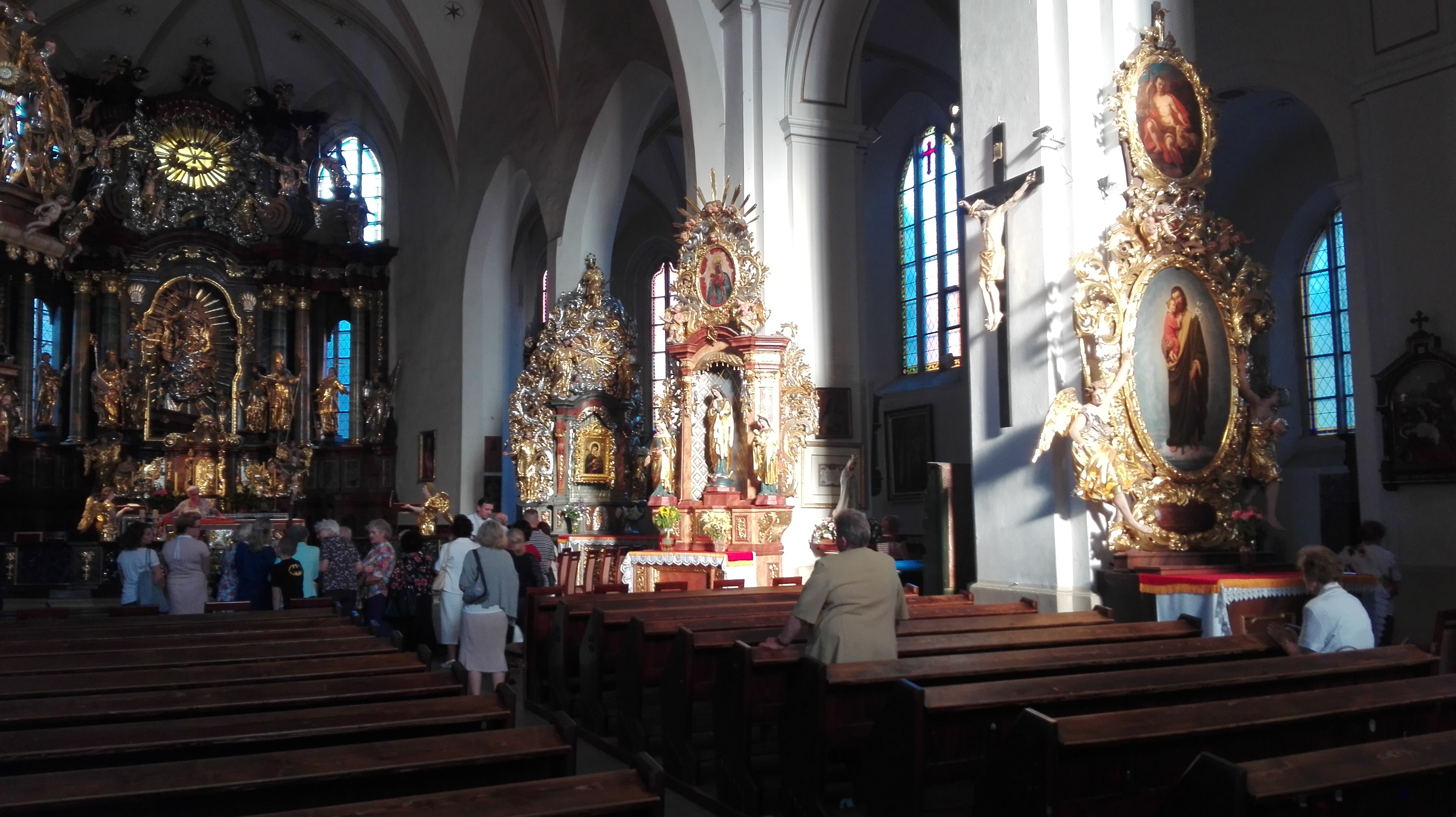 Bolesławiecka Bazylika Maryjna